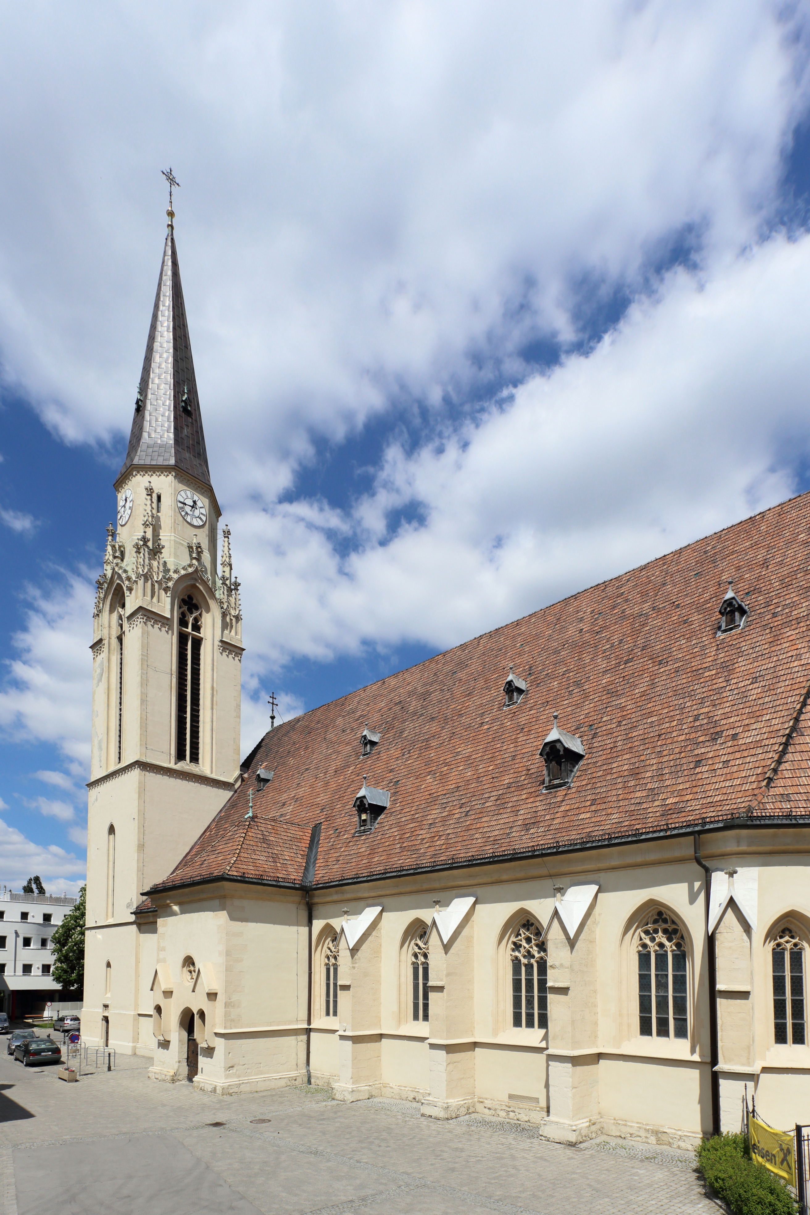 Südostansicht der katholischen Pfarrkirche hl. Ägydius in der niederösterreichischen Bezirkshauptstadt Korneuburg. Eine gotische Staffelkirche mit hohem Dach am nördlichen Rand der Altstadt. Der Chor, die Sakristei und das südliche Seitenschiff wurden in der 2. Hälfte des 14. Jahrhunderts errichtet. Ursprünglich hatte die Kirche Doppeltürme; der nördliche wurde bei der tiefgreifenden Renovierung im 17. Jahrhundert abgetragen. 1846 erfolgte eine Einwölbung des Mittelschiffes im neugotischen Stil. Von 1870 bis 1903 fand eine weitere tiefgreifende Renovierung statt. Bei dieser wurde unter anderem der Turm und die Westfassade neu errichtet.